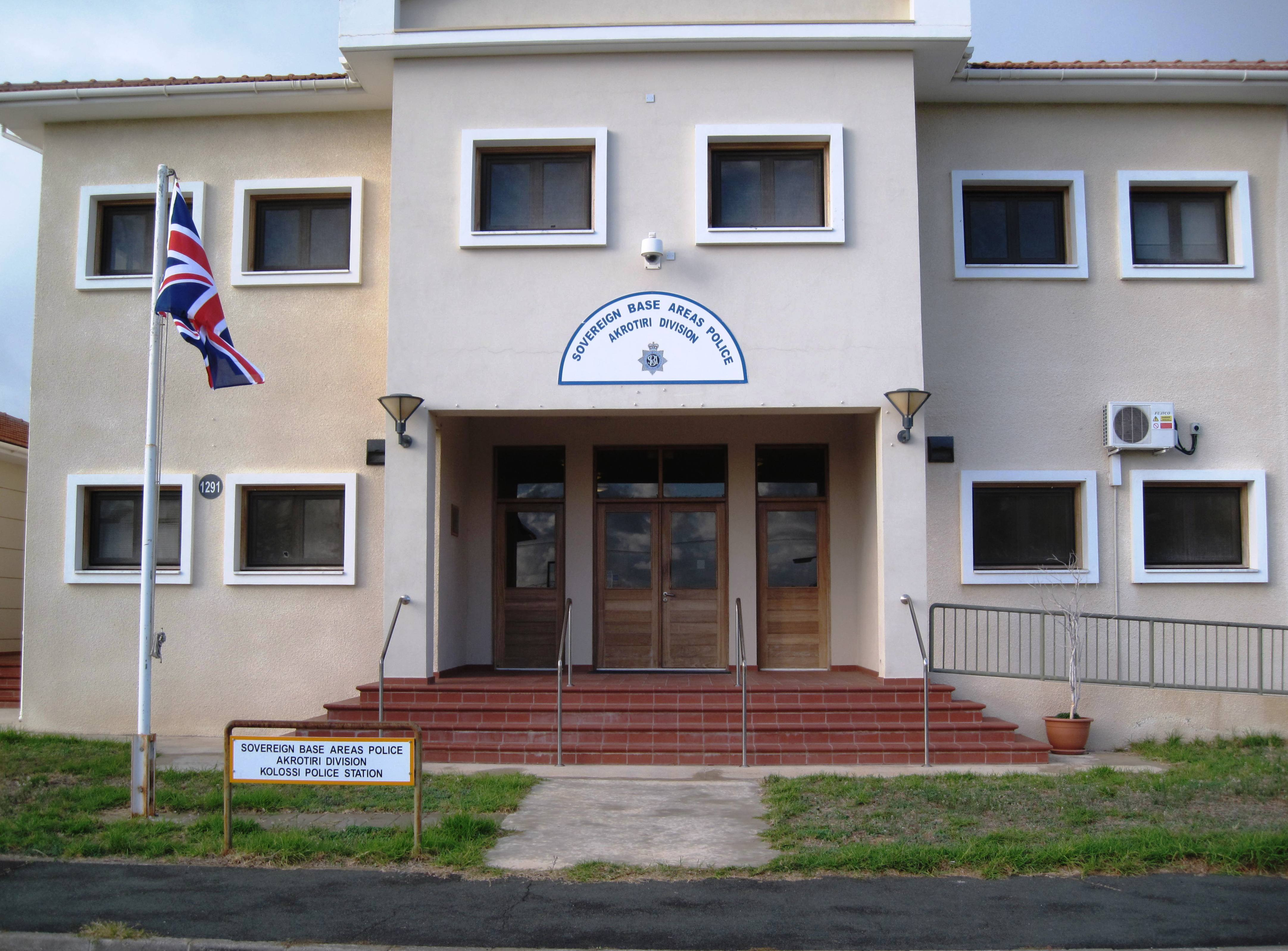 Souvereign Base Areas Politie bureau op Cyprus